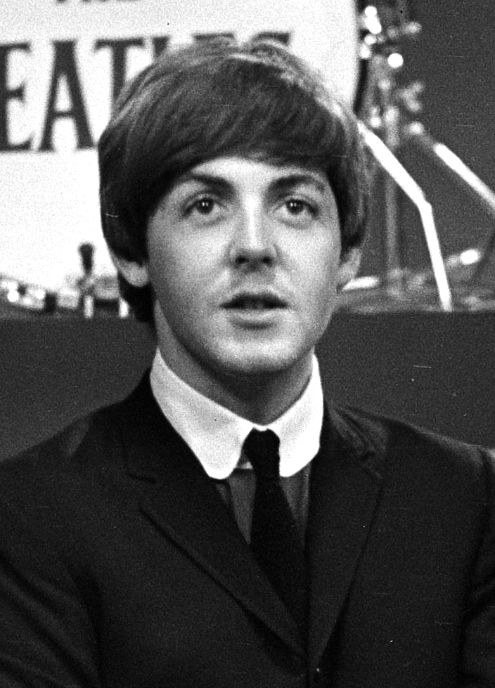 Collectie / Archief : Fotocollectie Anefo Reportage / Serie : [ onbekend ] Beschrijving : Televisie-optreden van The Beatles in Treslong te Hillegom [vlnr. George Harrison, Paul McCartney, John Lennon, Jimmie Nicol (vervanger van Ringo Starr] Datum : 5 juni 1964 Locatie : Hillegom Trefwoorden : groepsportretten, popgroepen, televisie Instellingsnaam : Beatles, The Fotograaf : Koch, Eric / Anefo Auteursrechthebbende : Nationaal Archief Materiaalsoort : Negatief (zwart/wit) Nummer archiefinventaris : bekijk toegang 2.24.01.05 Bestanddeelnummer : 916-5098